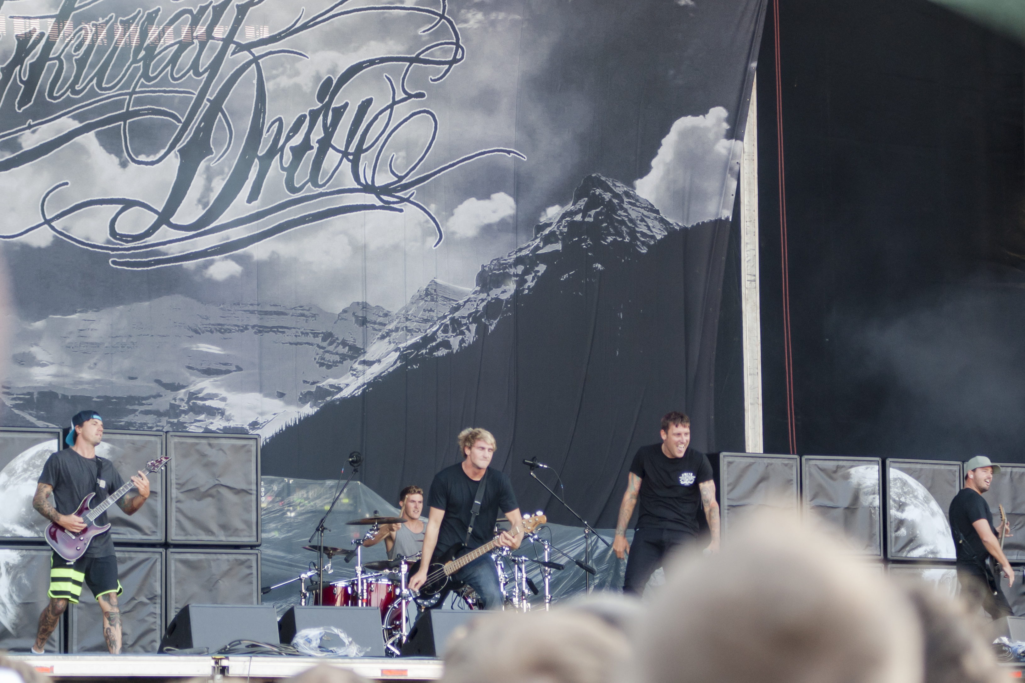 Luke Kilpatrick, Ben Gordon, Jia O'Connor, Winston McCall i Jeff Ling podczas festiwalu Ursynalia 2013